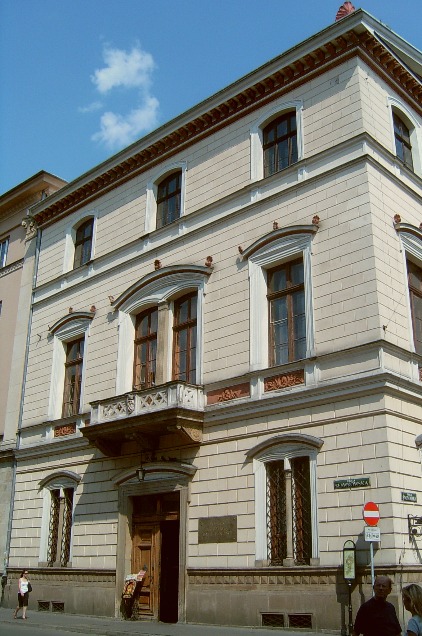 Kraków, ul. Sławkowska 17 (narożnik ul. Św. Marka), Poland